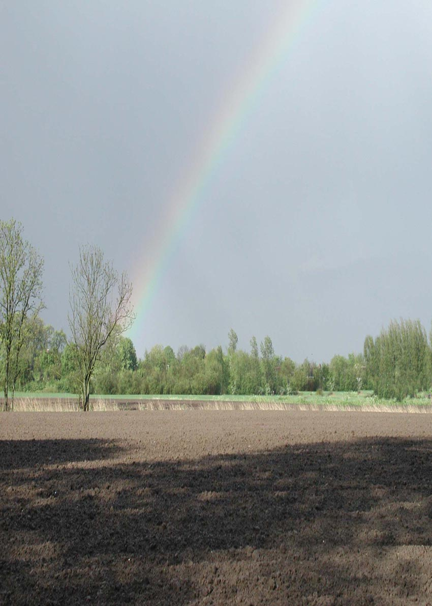 reinbôge